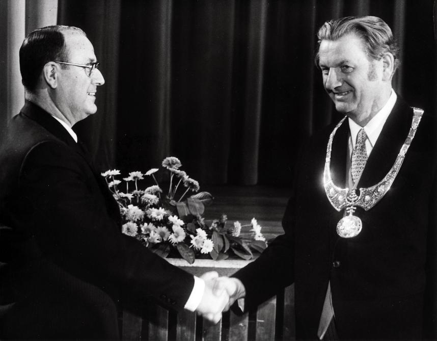 R. Laan (PvdA) geïnstalleerd door de commissaris van de koningin( Mr. Kranenburg) als burgemeester van Zaanstad. Nederland, 2 januari 1974.